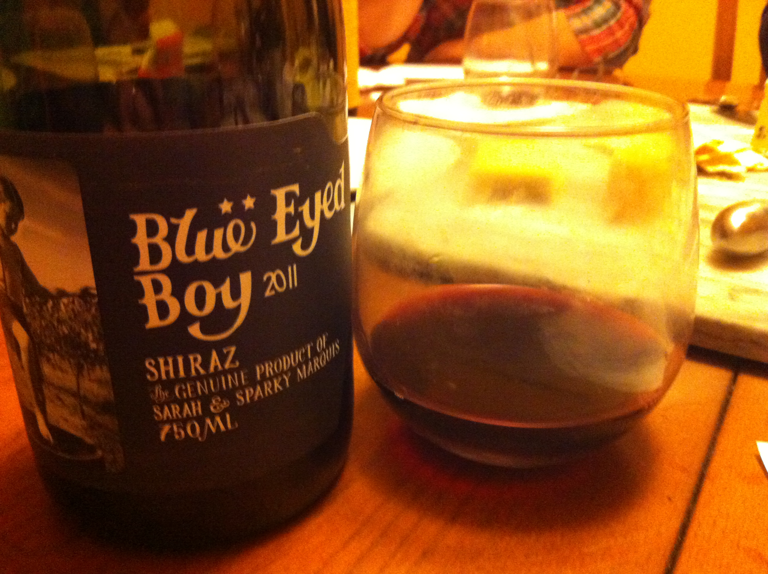 Australian Shiraz